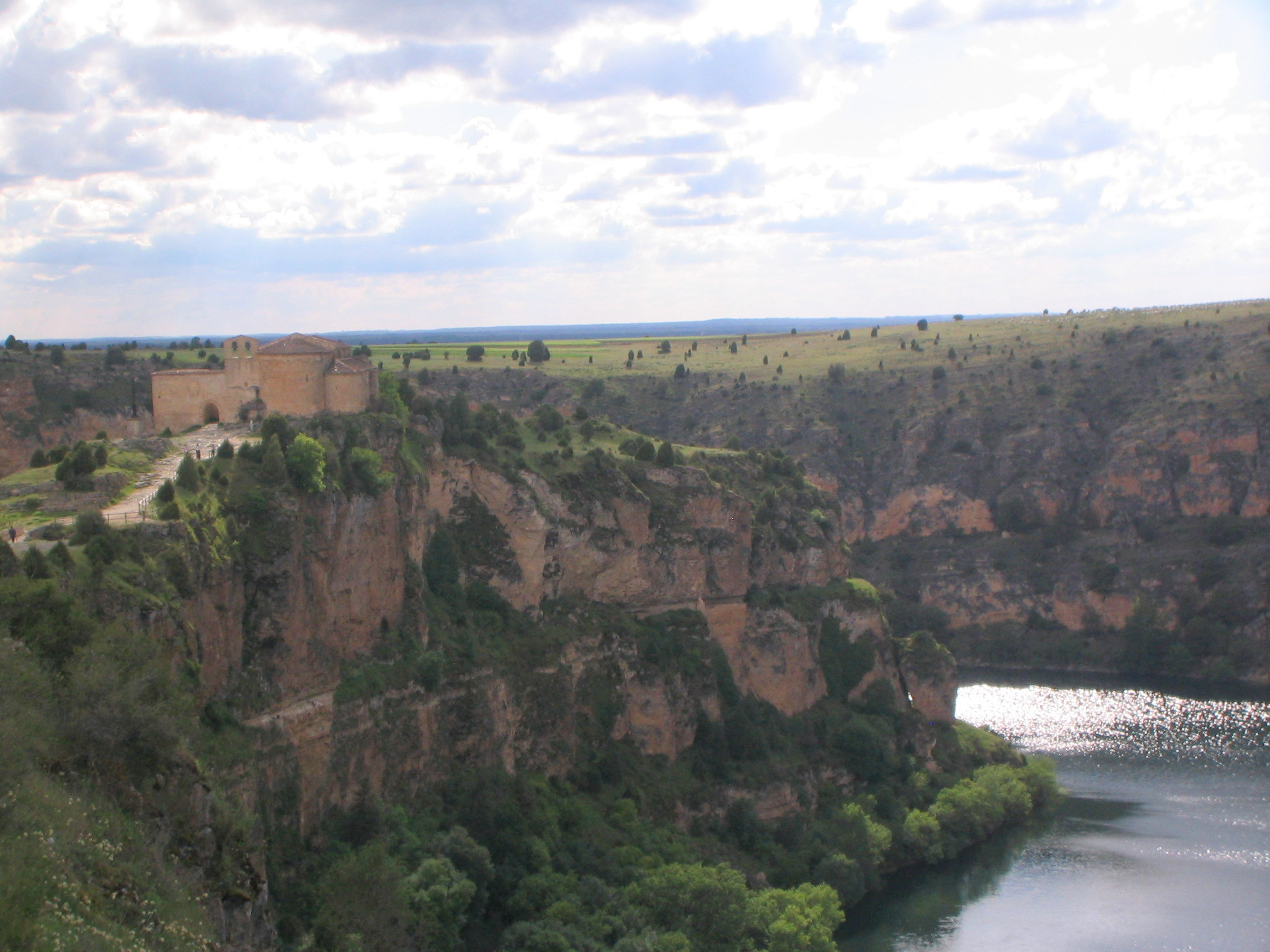 Hoz y ermita de san Frutos en el Parque Natural de las Hoces del Río Duratón (Segovia, España).